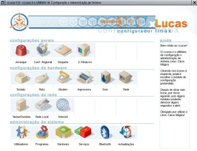 xLucas